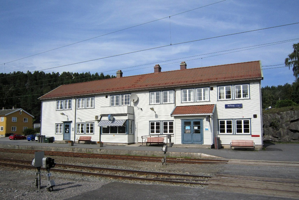 Nelaug stasjon